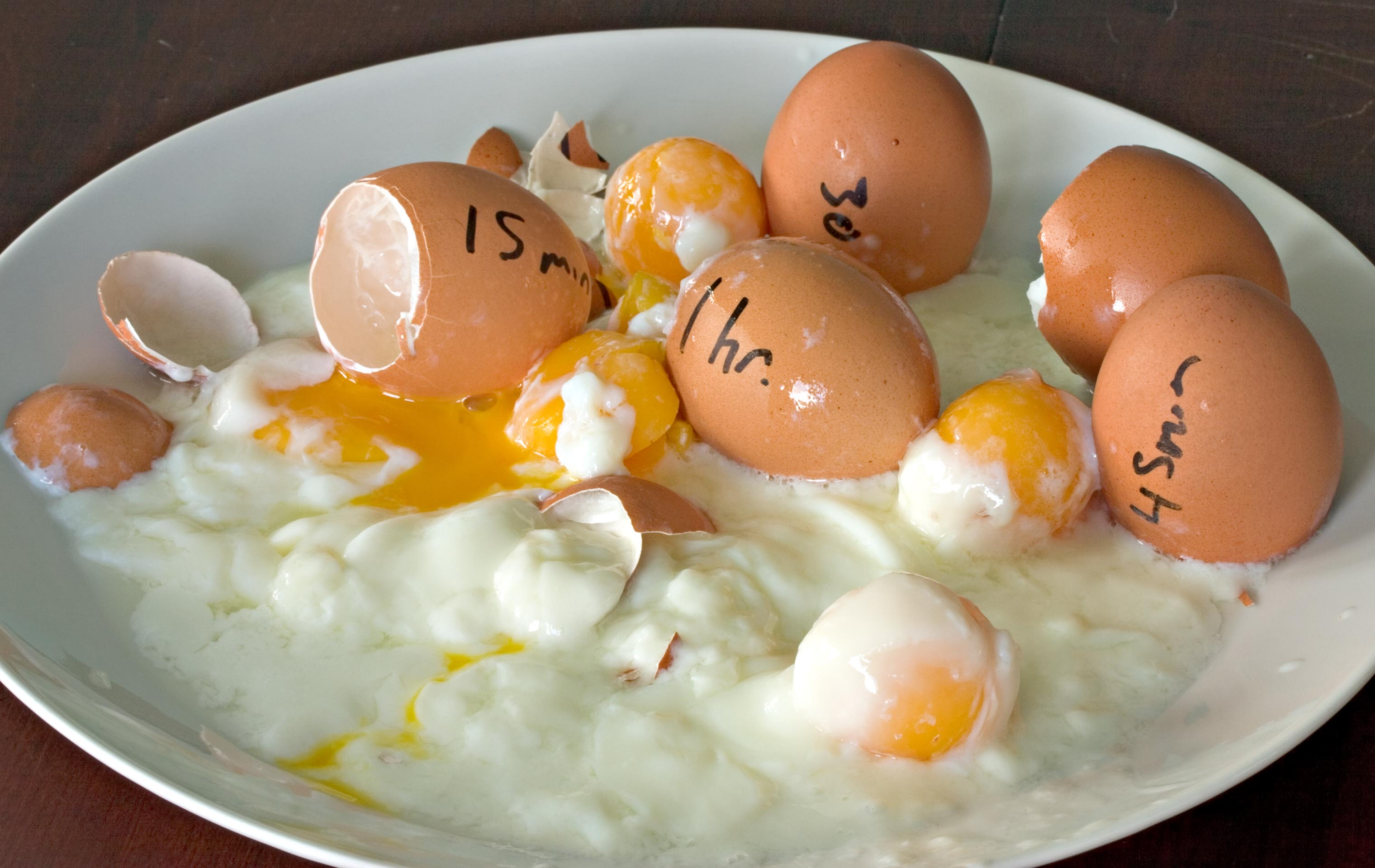 Egg Cookery